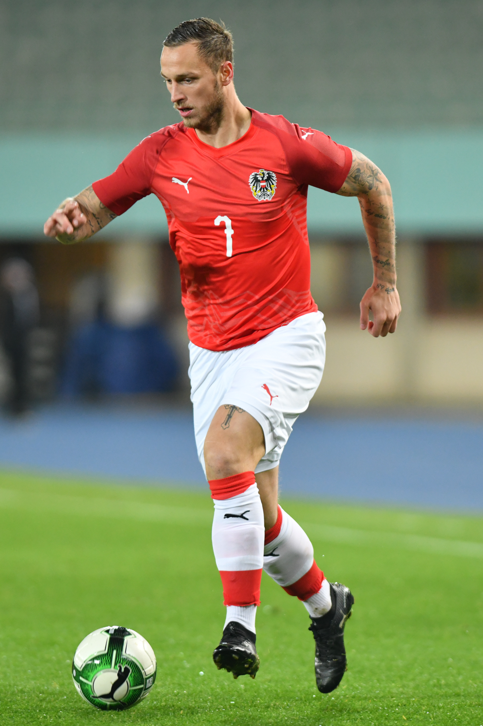 Wien, Österreich, 14.11.2017, Sport, Fussball, OEFB Freundschaftliches Laenderspiel - Österreich vs Uruguay. Bild zeigt Marko Arnautovic (AUT).